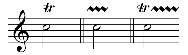 trill notation